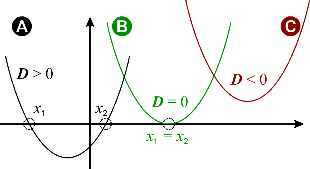 Quadratische Parabel in einem Koordinatensystem, gezeigt für drei Fälle: Zwei Nullstellen (A), x1 und x2 Eine doppelte Nullstelle (B), x1 = x2 Keine reelle Nullstelle (C)